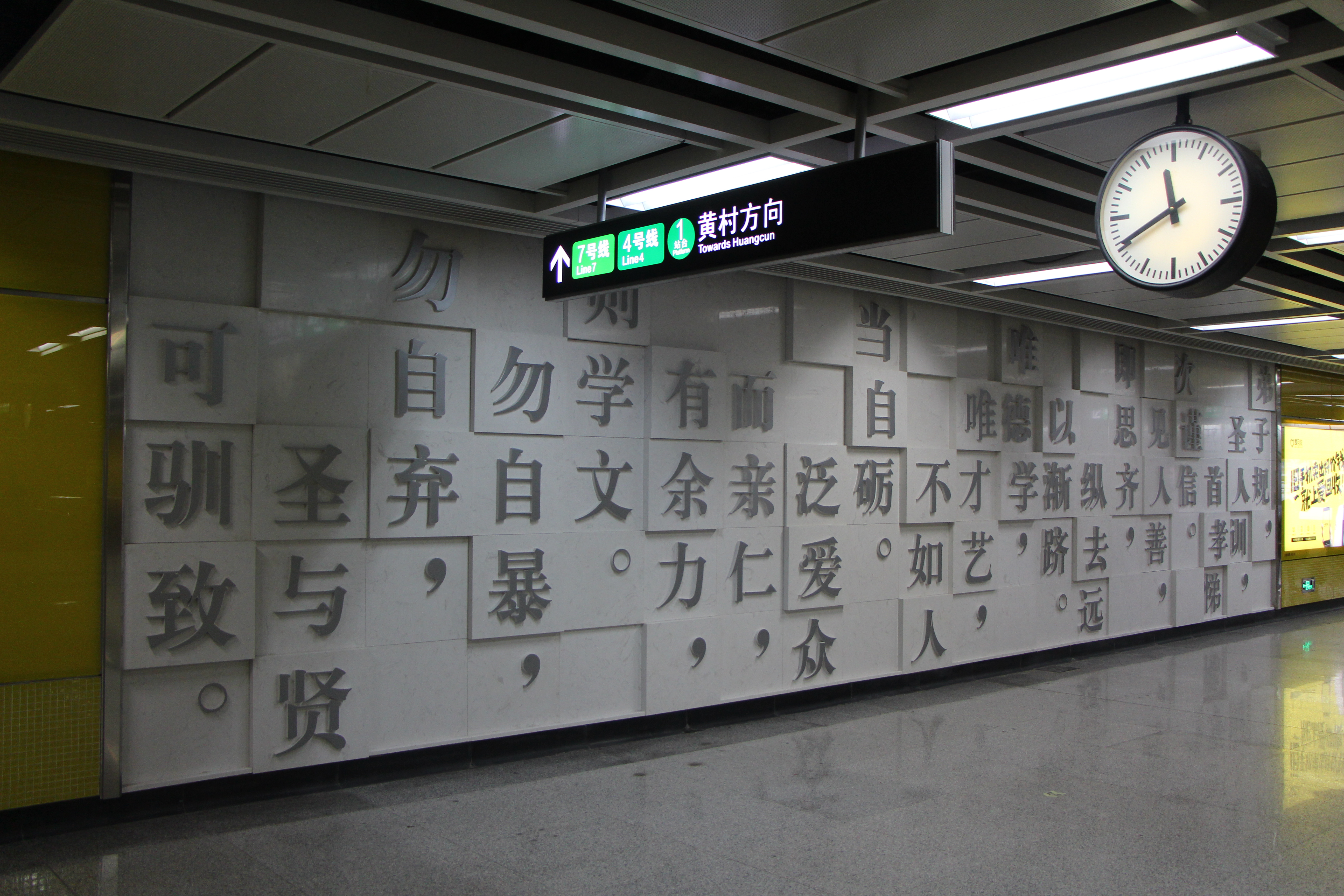 广州地铁大学城南站